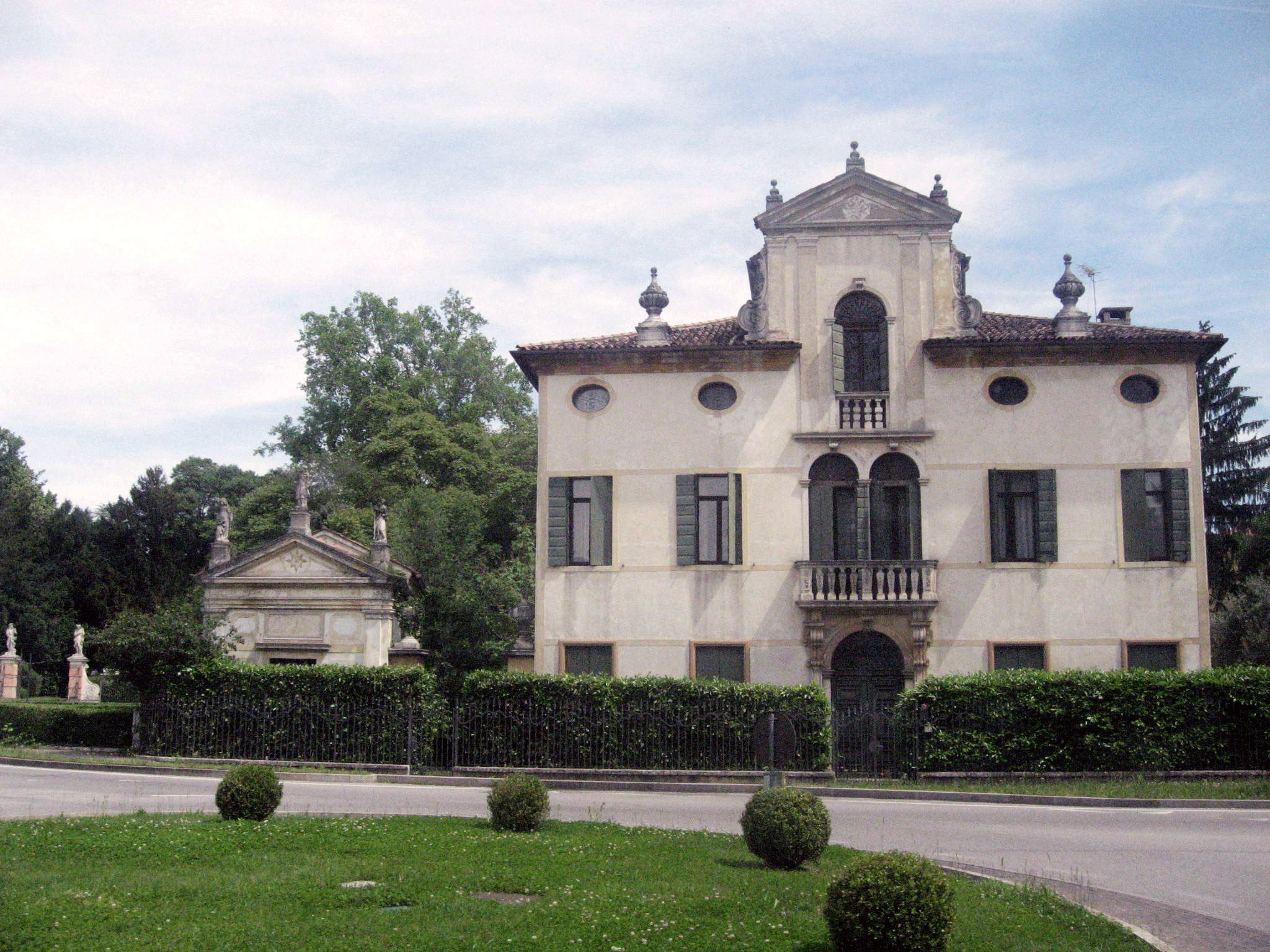 Villa Todeschini a Noventa Padovana